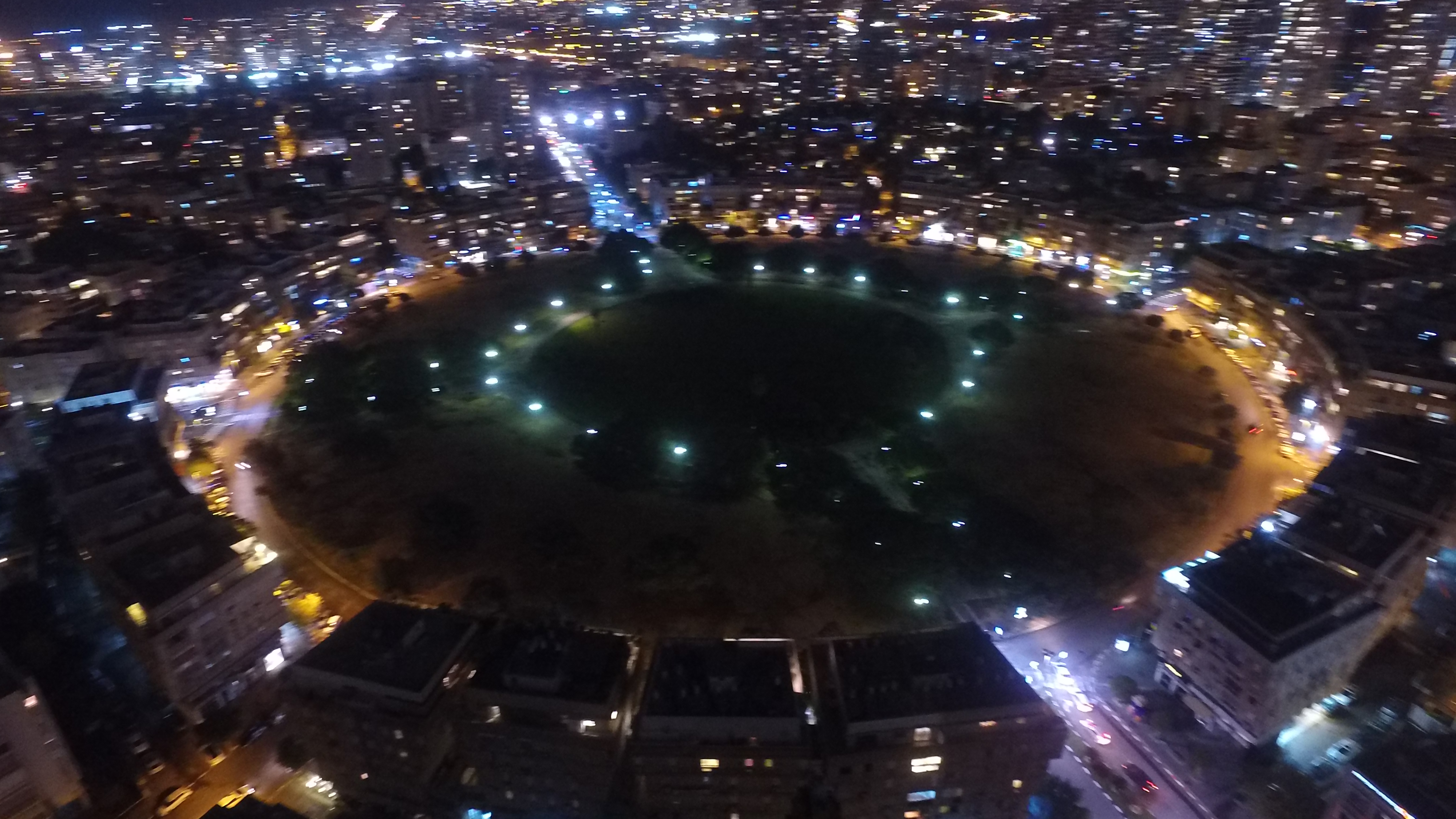 כיכר המדינה